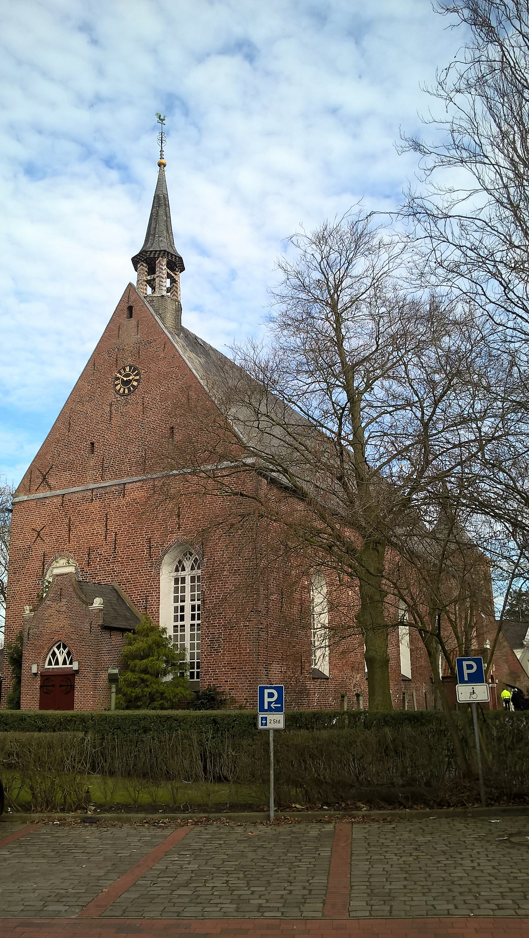 Südwesten der Georgskirche in Weener, Ostfriesland, Niedersachsen, Deutschland